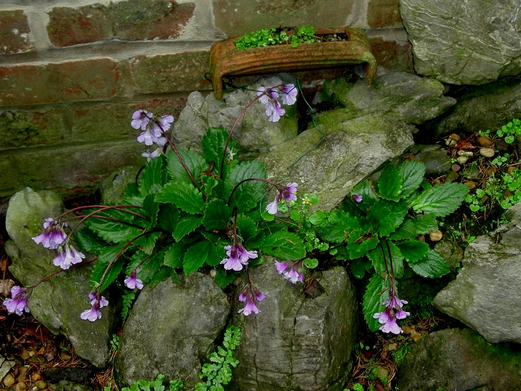 Haberlea rhodopensis (en culture)